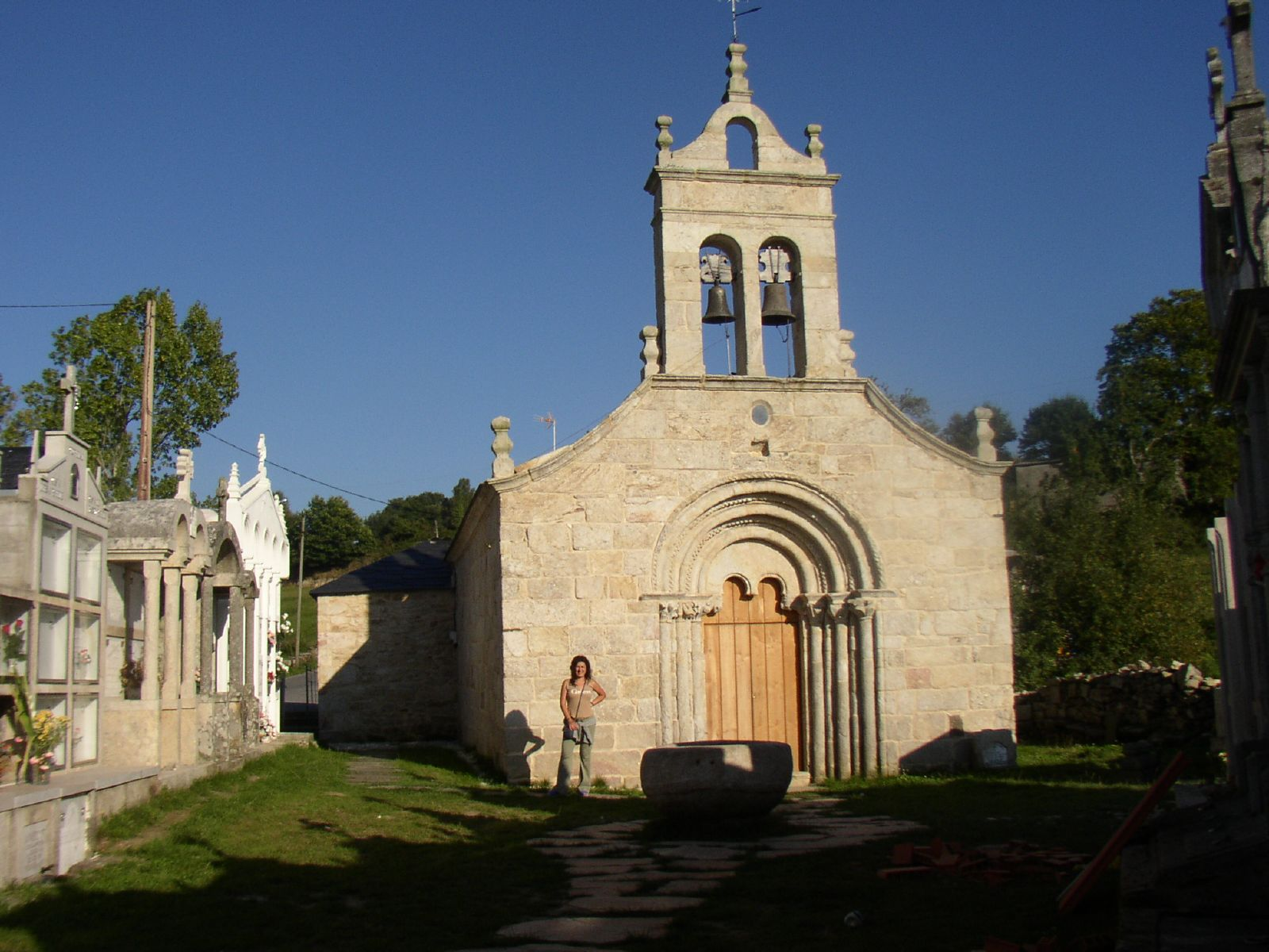 Igrexa de Santa María de Mirallos na parroquia de Ferreiros, concello de Paradela